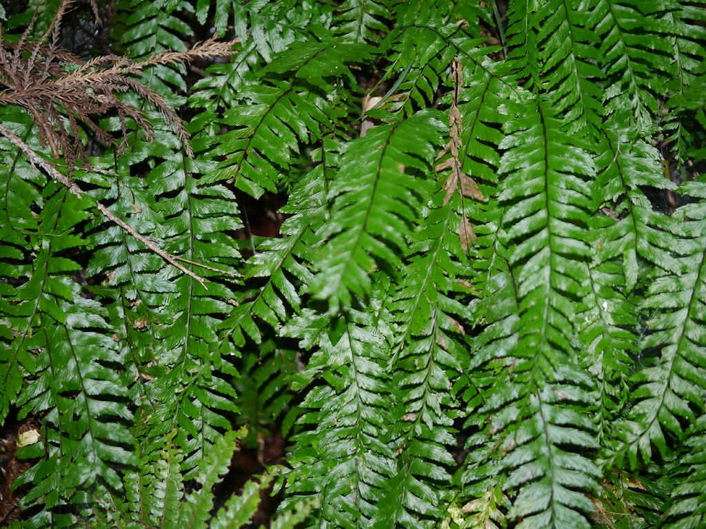 Asplenium hondoense：ホウビシダ 2015/08/01 和歌山県田辺市：Tanabe City. Wakayama Pref. Japan